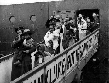 Spaarnestad Photo/SFA001004357 Repatriëring Ambonezen. Het schip de "Kota Inten". K.N.I.L.militairen, marine mensen. Nederland, Rotterdam, 21/22 maart 1951.